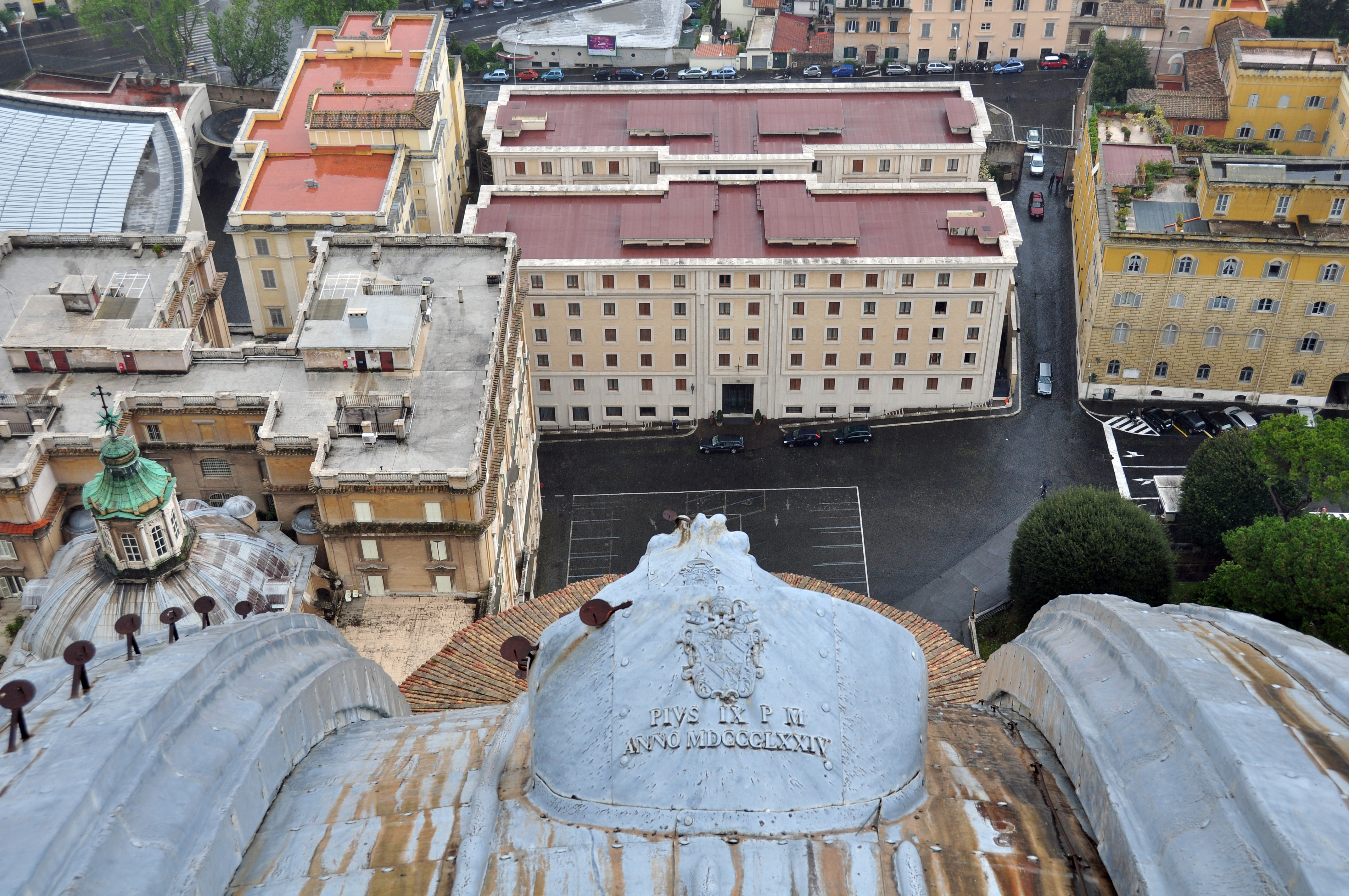 Италия